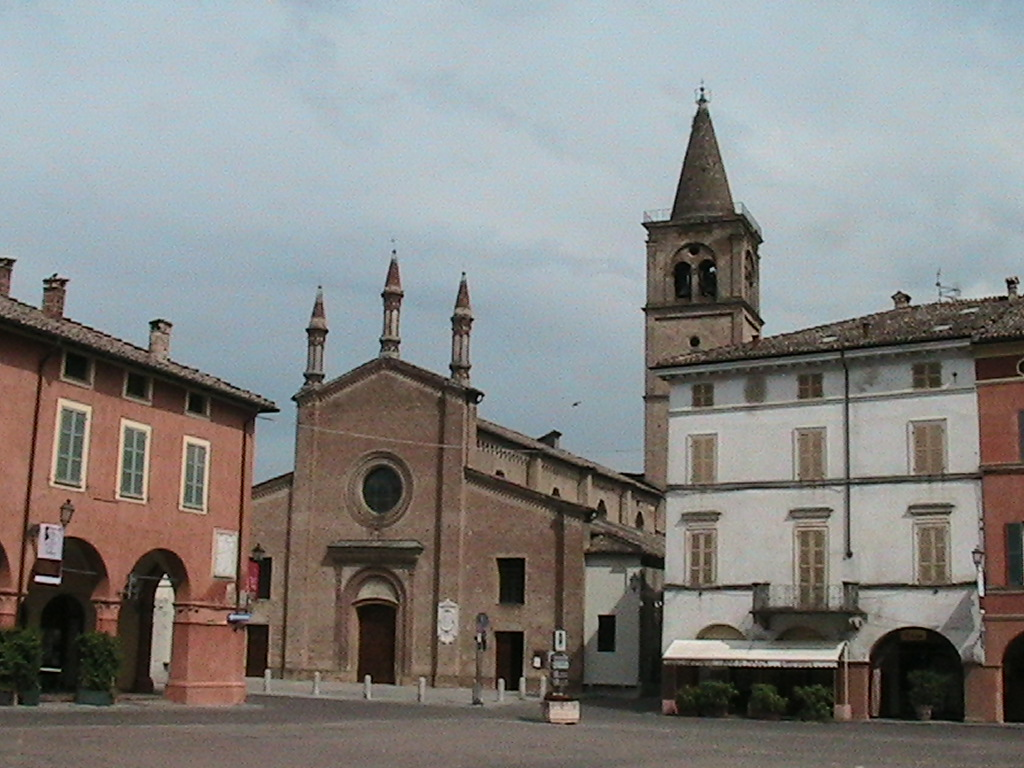 Busseto - Chiesa Collegiata di San Bartolomeo